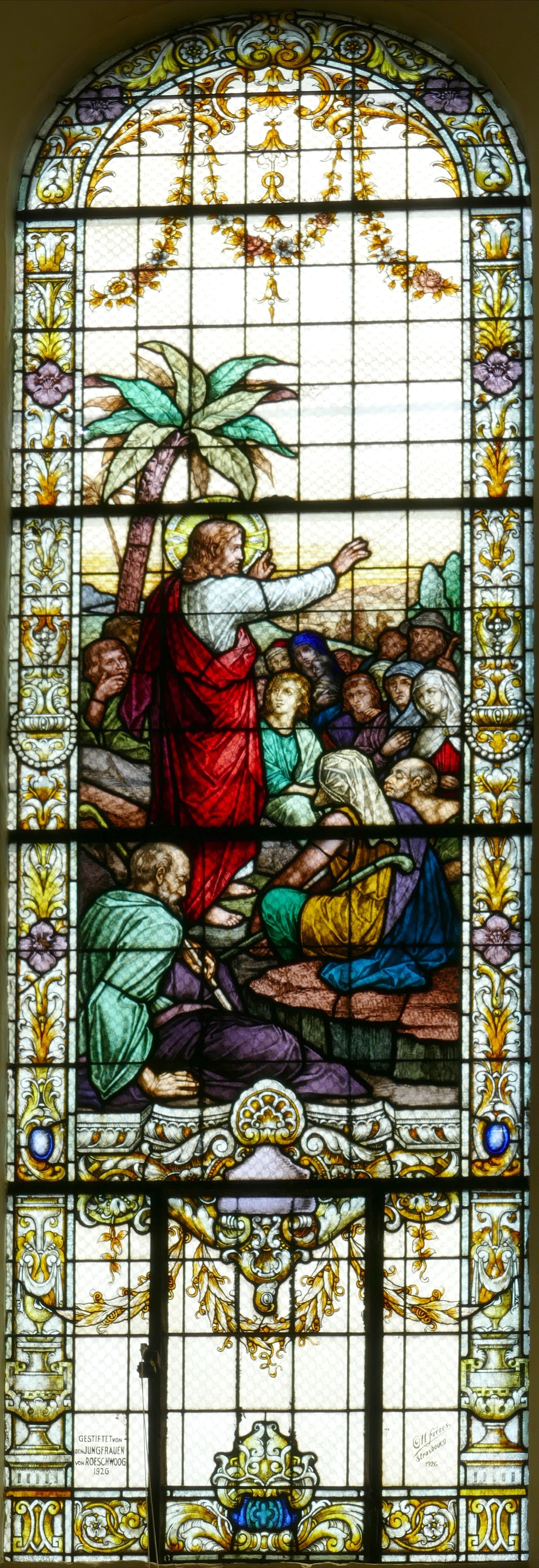 Alsace, Bas-Rhin, Rœschwoog, Église Saint-Barthélemy (IA00123756): Verrière "Sermon sur la montagne" (Ott Frères, XXe).